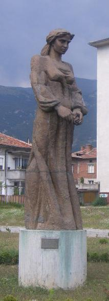 monumento de roz-rikoltistino en Karlovo (2005)